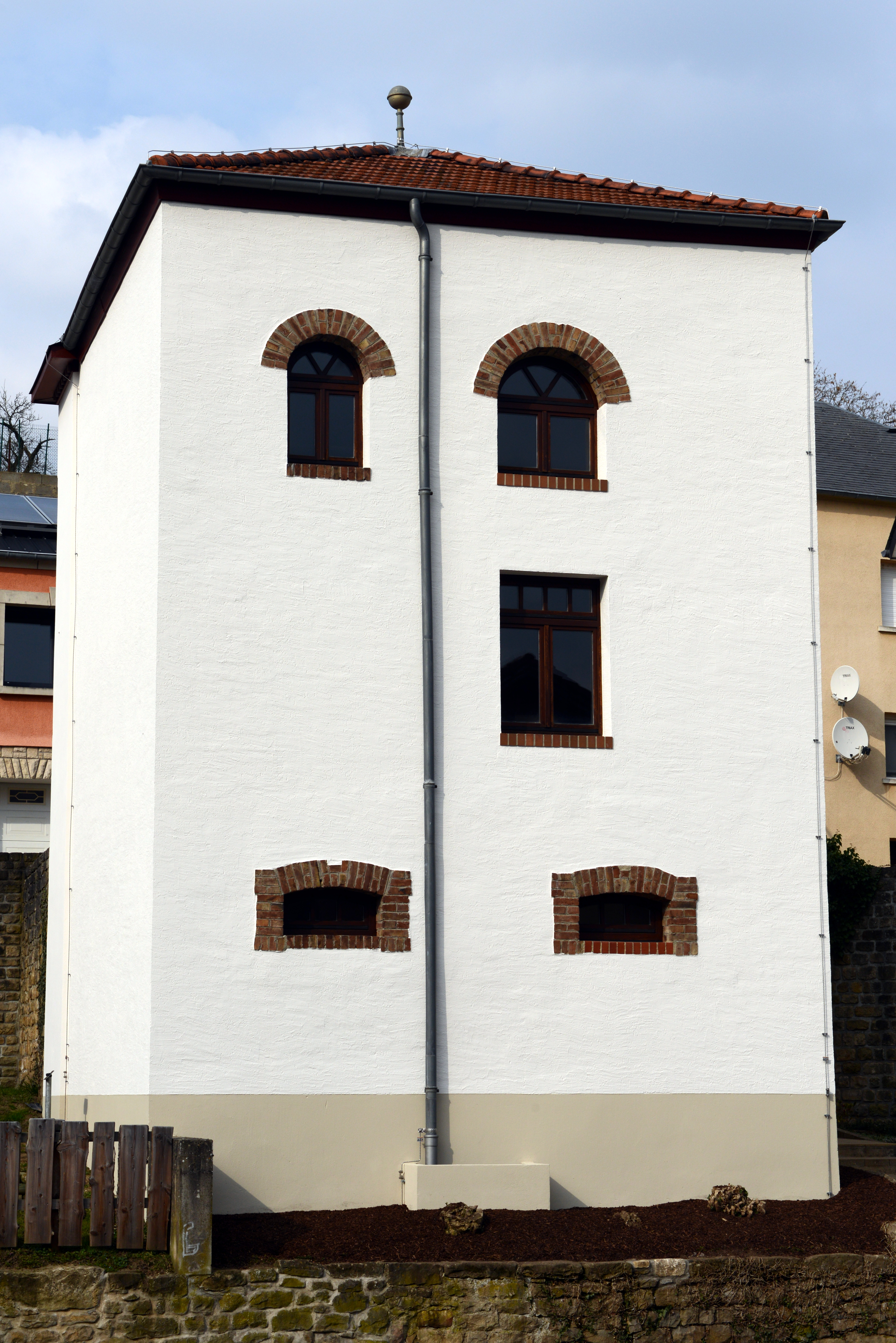 D'renovéiert Munnerefer Synagog am Mäerz 2015.